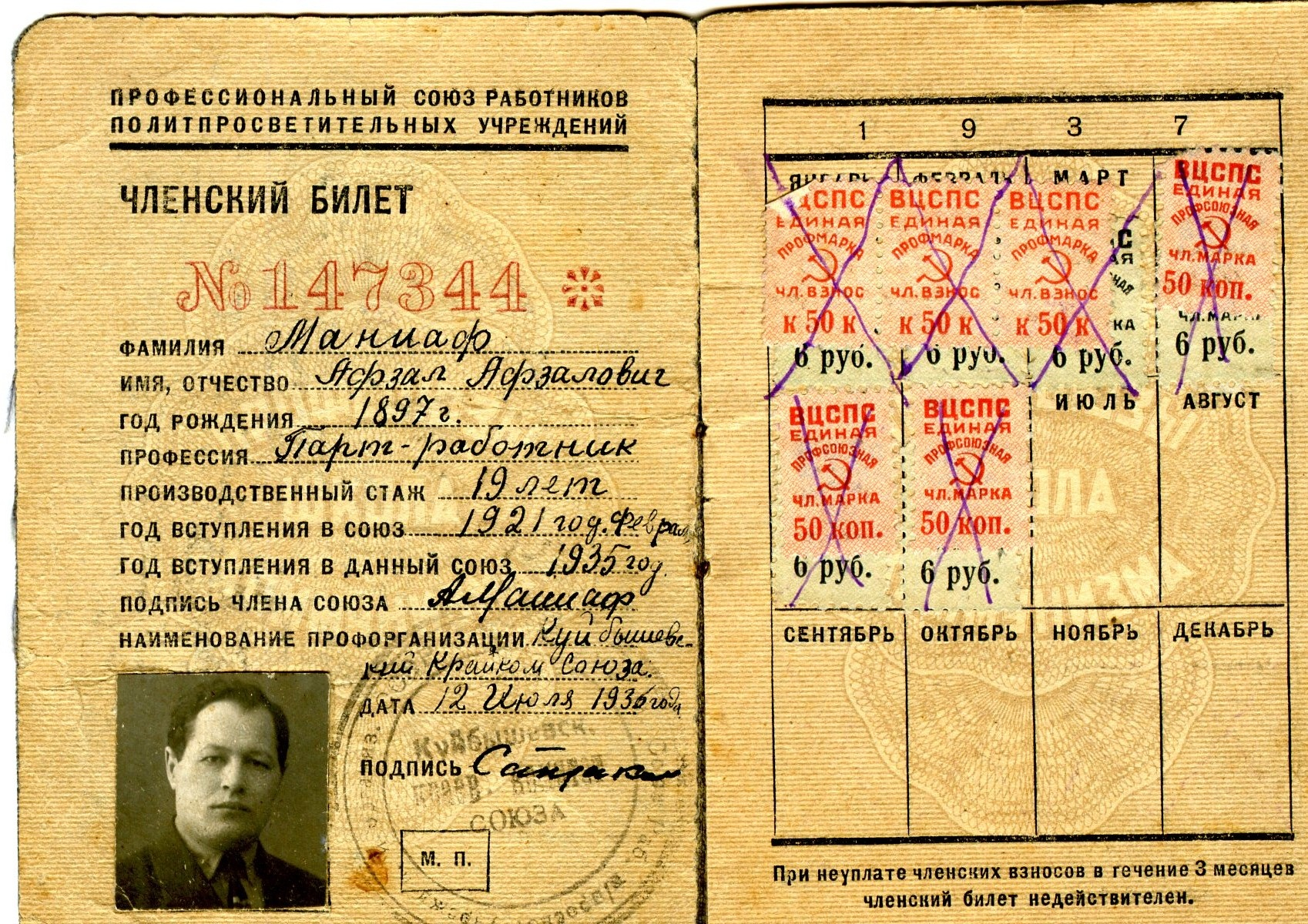 Профсоюзный билет ВЦСПС - "Всесоюзного центрального совета профессиональных союзов" Образца 30-х годов